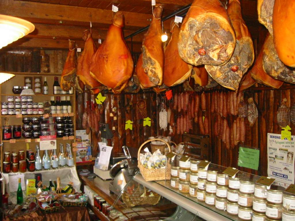 Salaison de montagne, Noël Thaurin, Moutaine, Jura, France